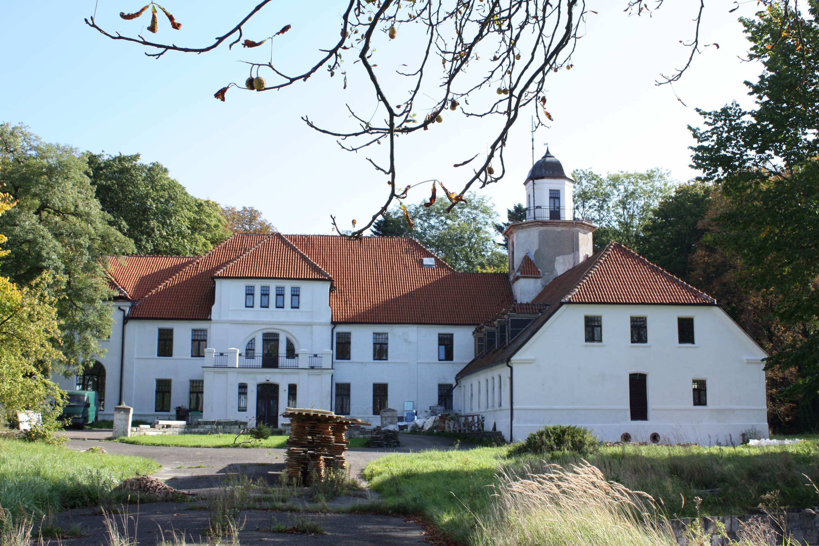 Pałac w Biesiekierzu (nr rejestr. 1200)